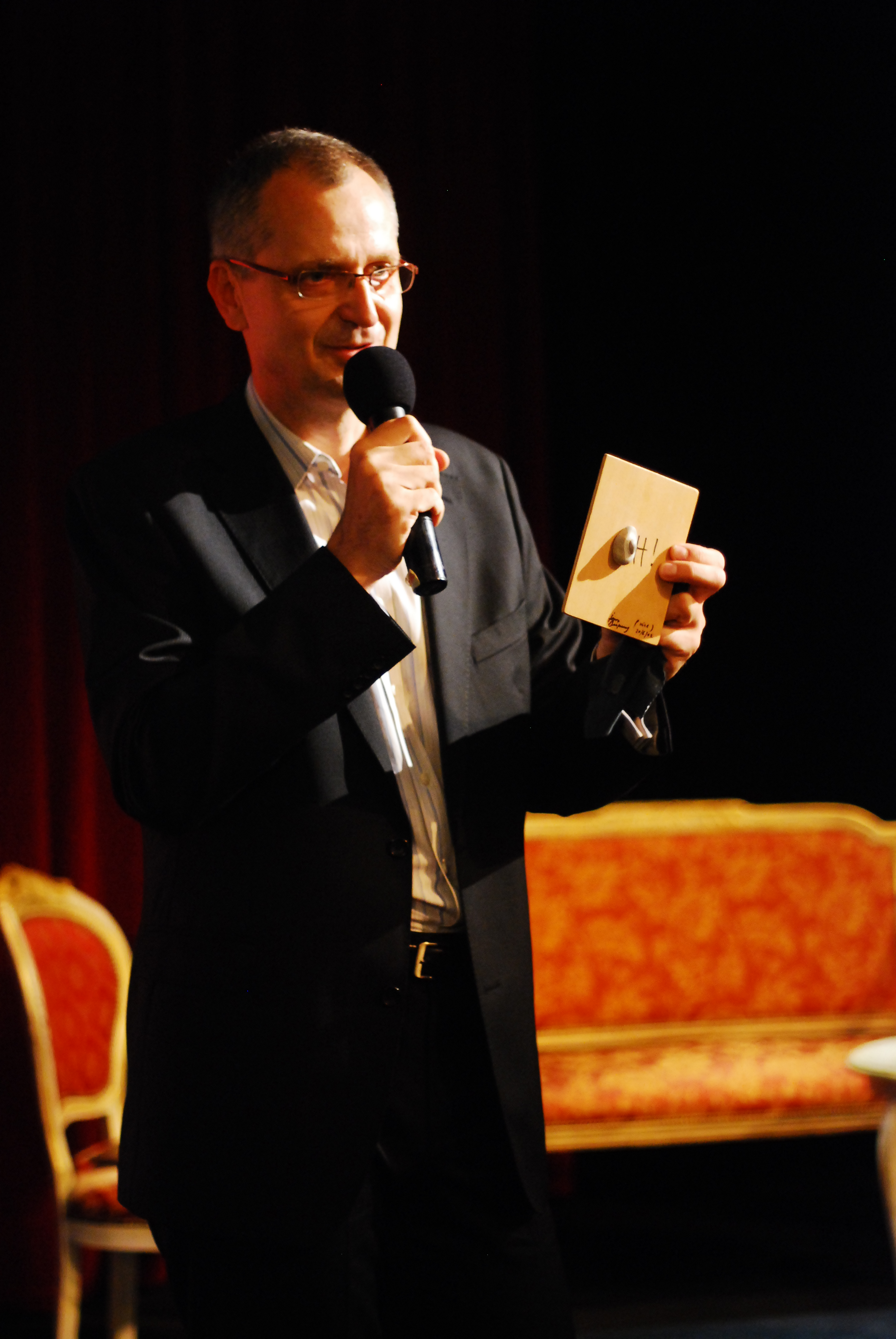 Dariusz Bugalski (Program III, Polskie Radio), prowadzący Literaturomanie 2009.